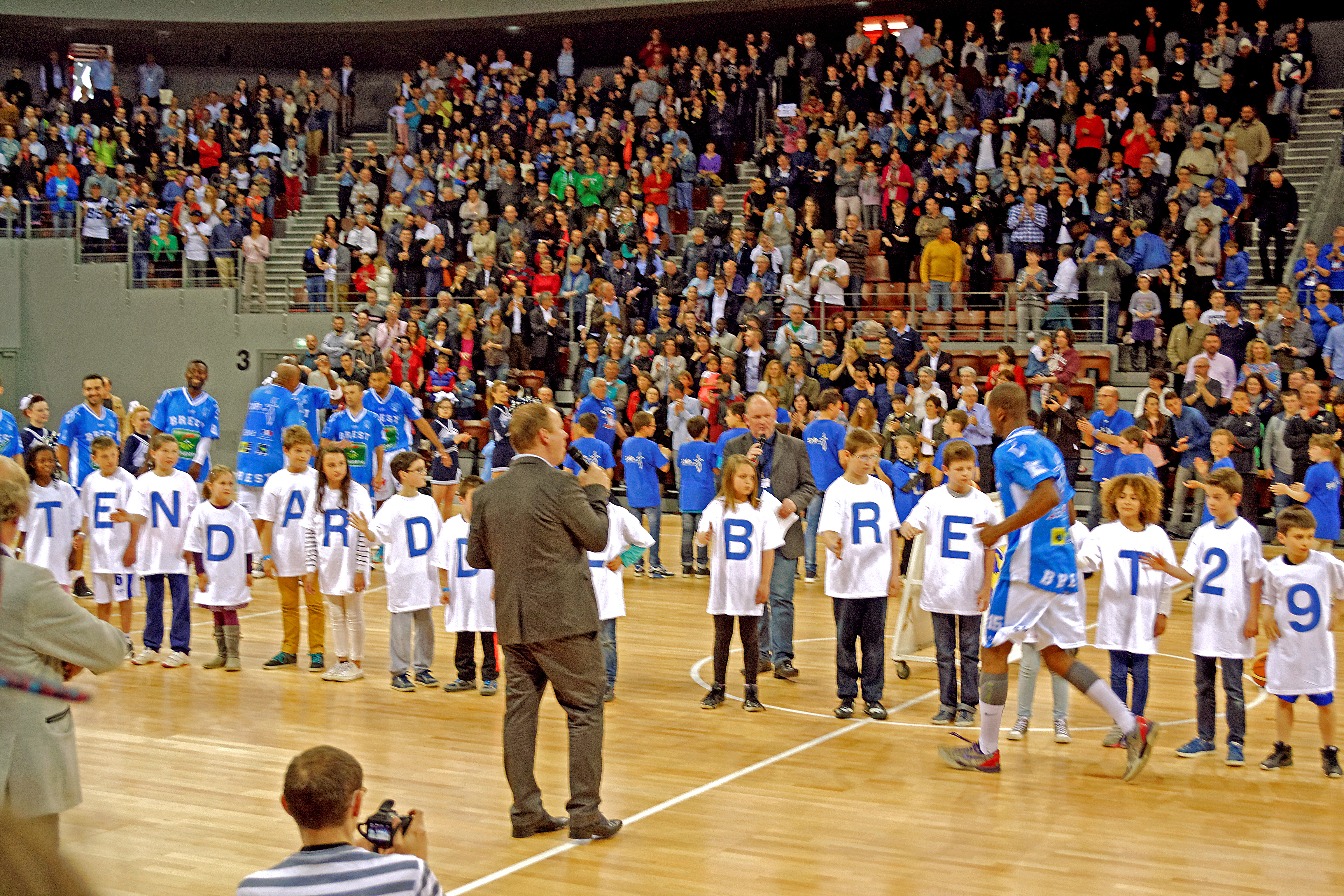 25 avril 2015. Match de basketball dans la salle Brest Arena marquant les premiers pas de l'équipe de Brest, l'Étendard de Brest, dans l'enceinte conçue à l'origine pour elle.